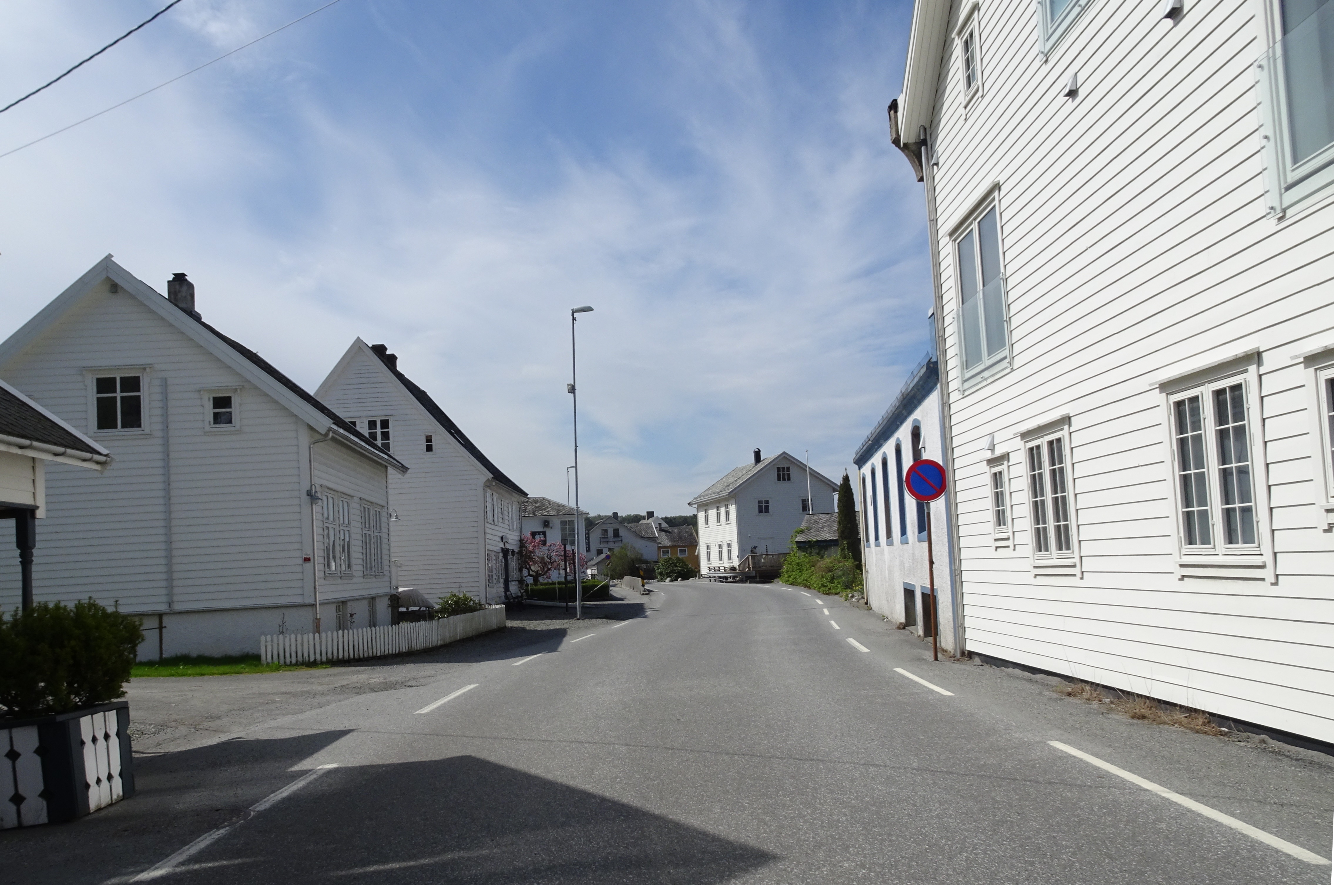 Fylkesvei 548 (tidl. 48) i Skånevik